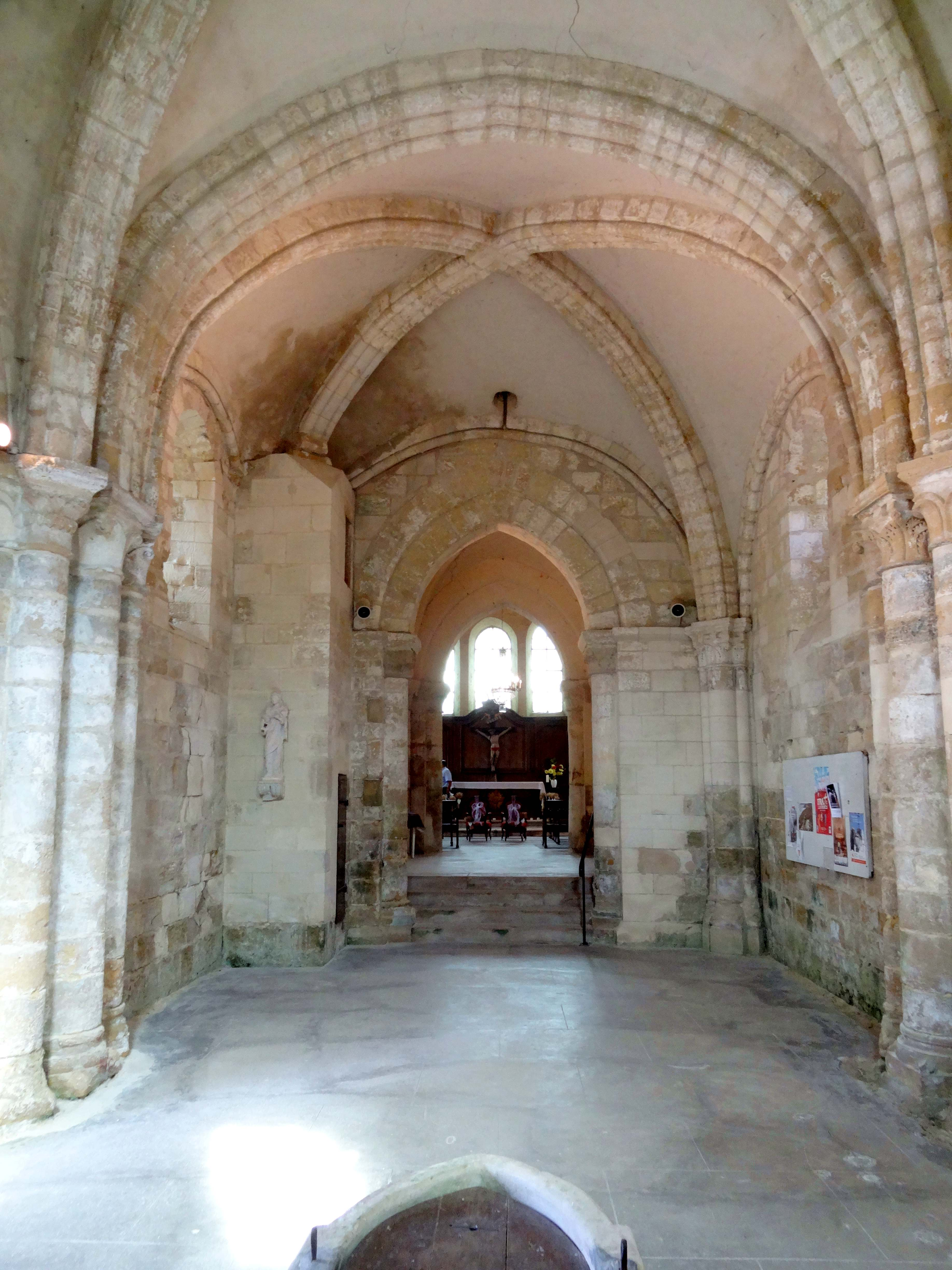 Intérieur de l'église - voir titre.